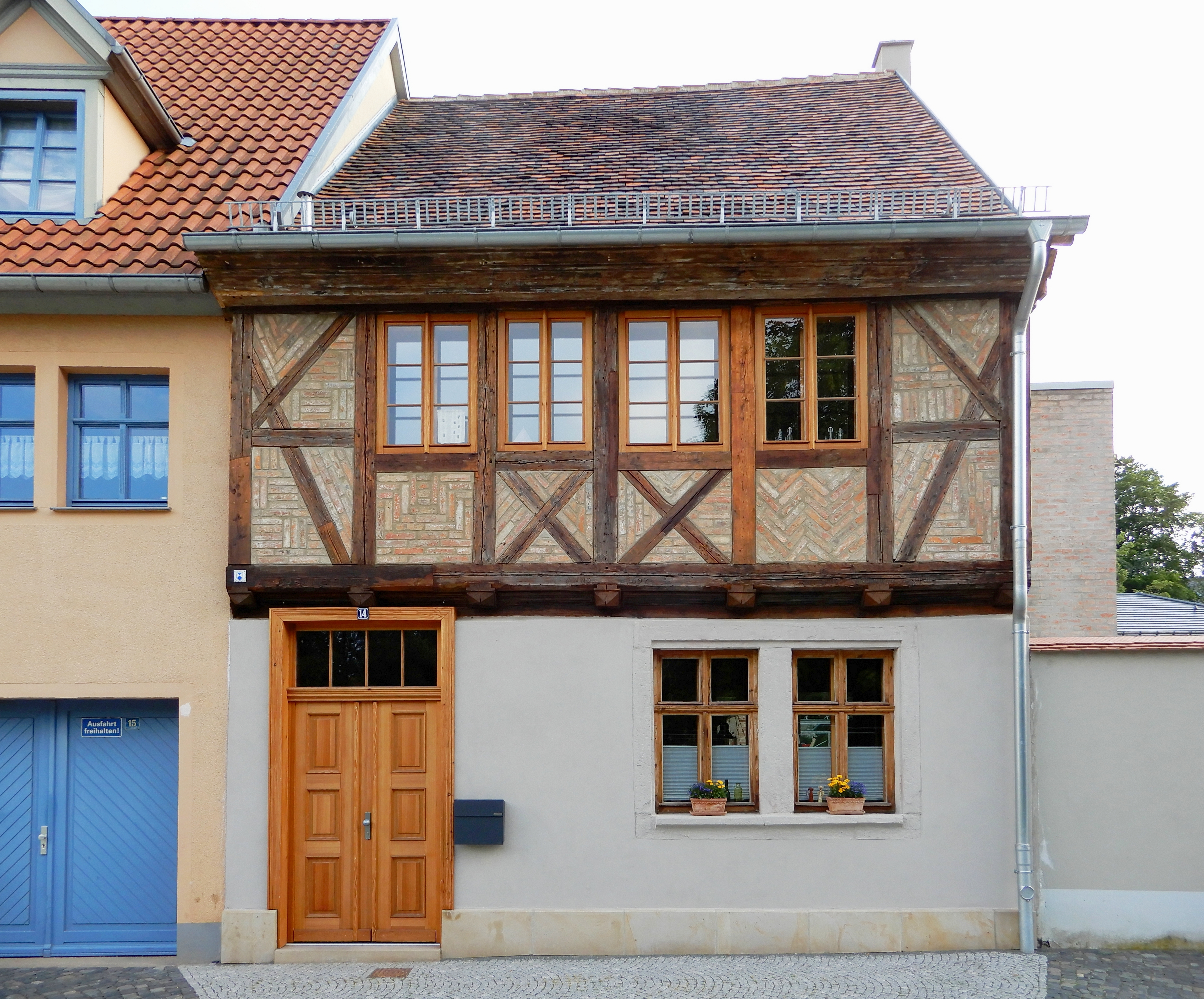 Gebäude Über dem Wasser 14 in Aschersleben